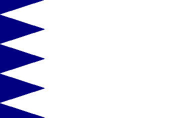 Bandera de Layos (Toledo)